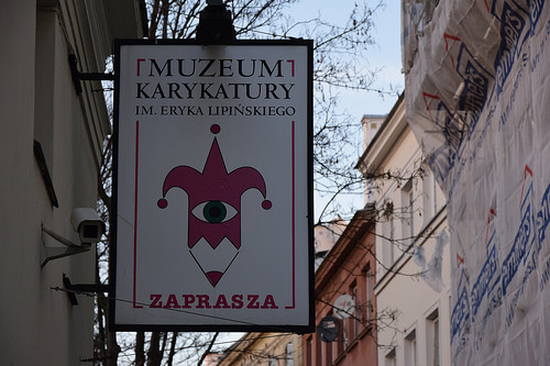 Aushängeschild auf dem Museumsgebäude